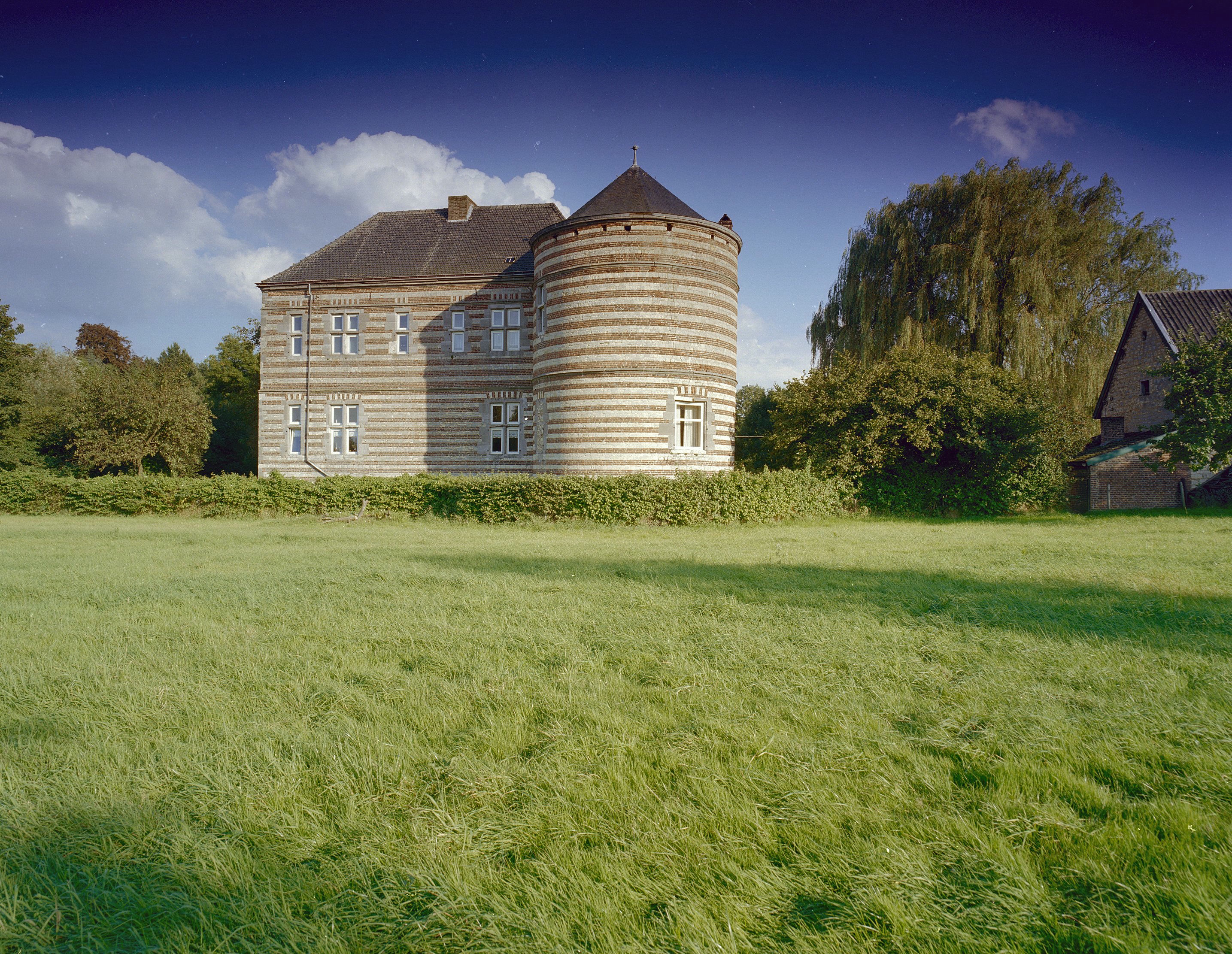 Kasteel De Bongard: Overzicht van de linker zijgevel, op de hoek met de voorgevel een ronde hoektoren, en omgeving (opmerking: Gefotografeerd voor Kastelen in Limburg (1000-1800), Burchten en landhuizen)